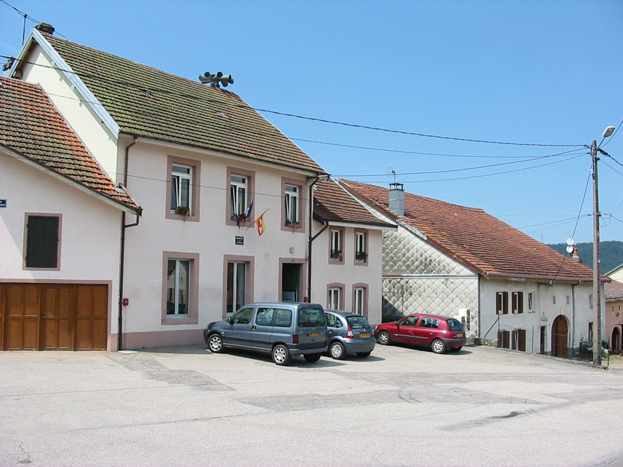 Mairie de La Chapelle-devant-Bruyères, commune française du département des Vosges.